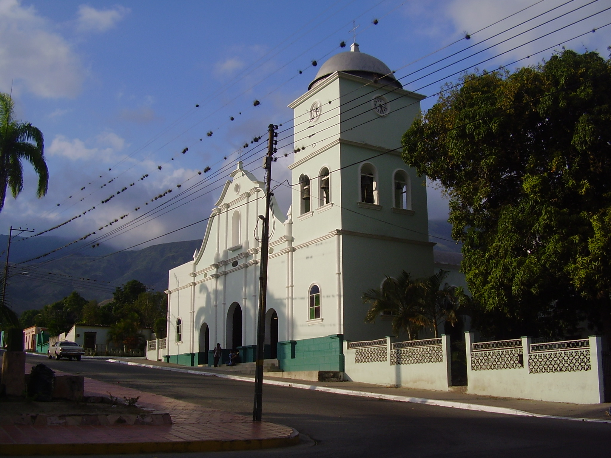 Fachada SIP Cocorote